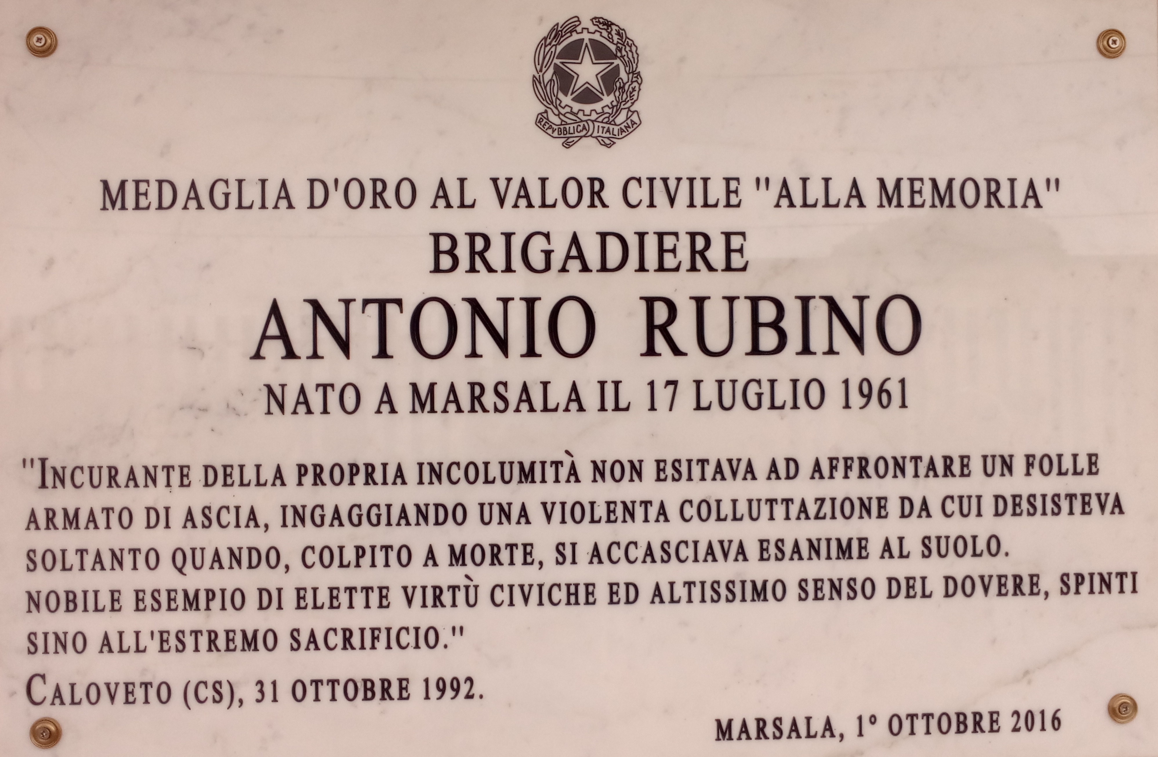 Medaglia d'oro al Valore Civile